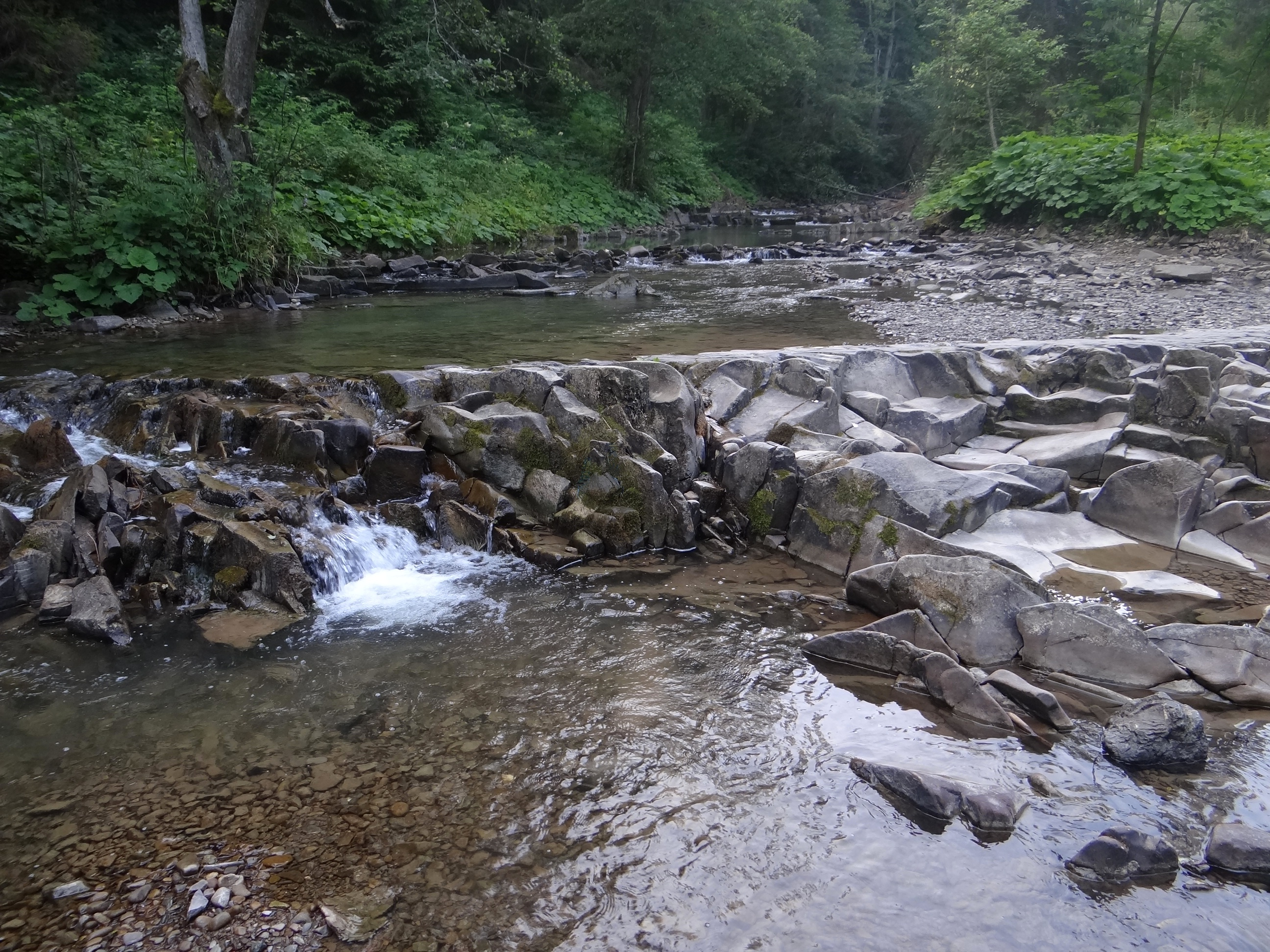 Potok Cicha w Soblówce